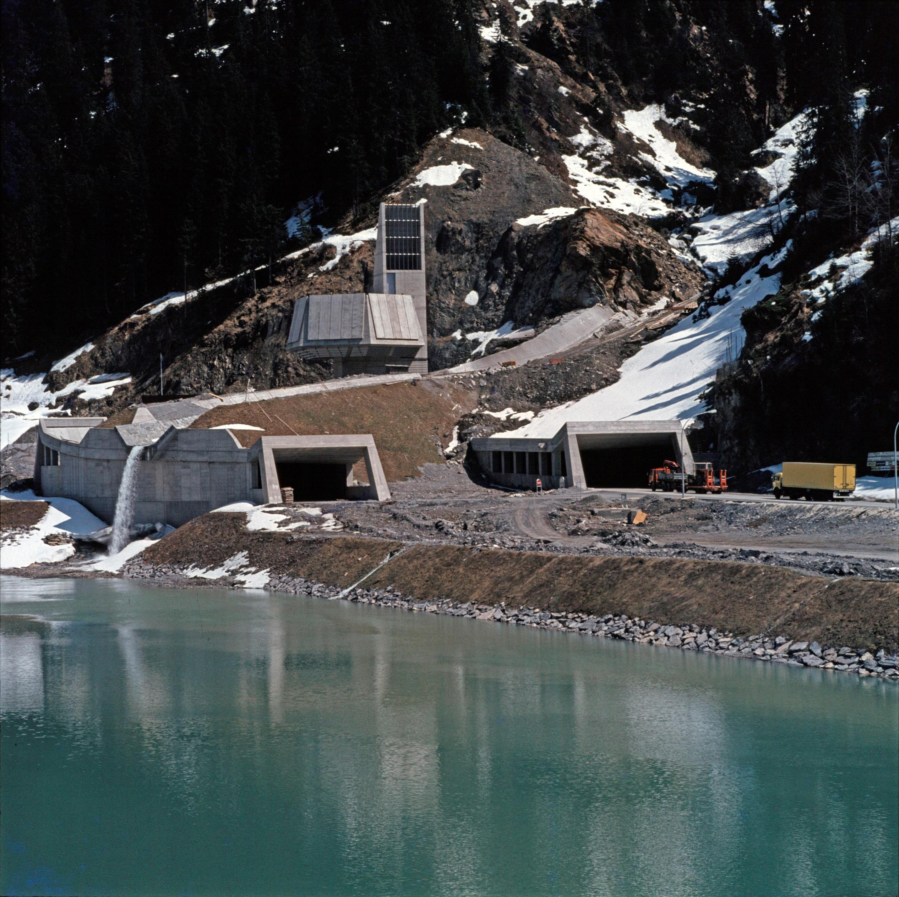 Das Westportal des Arlberg-Straßentunnels in Langen am Arlberg kurz nach seiner Fertigstellung im Dezember 1978 auf einer Aufnahme aus dem Mai 1979.